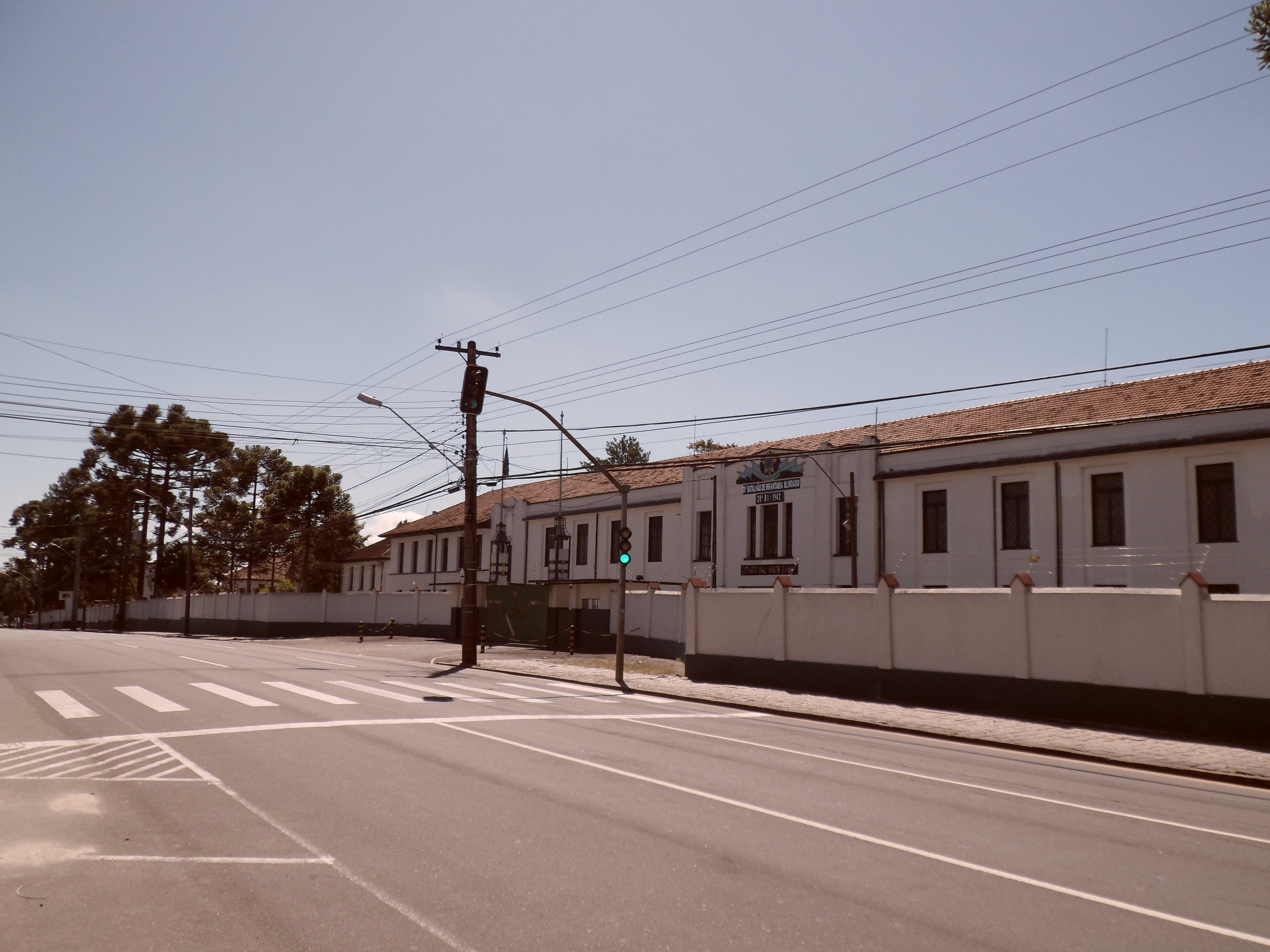 Quartel do 20º Batalhão de Infantaria Blindado, no bairro do Bacacheri, em Curitiba, capital do estado brasileiro do Paraná.